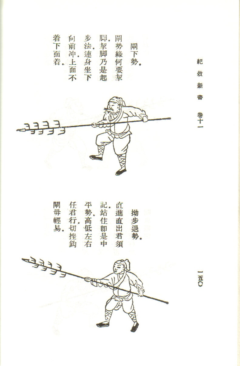 Soldado Chino con Langzian, Dinastia Ming